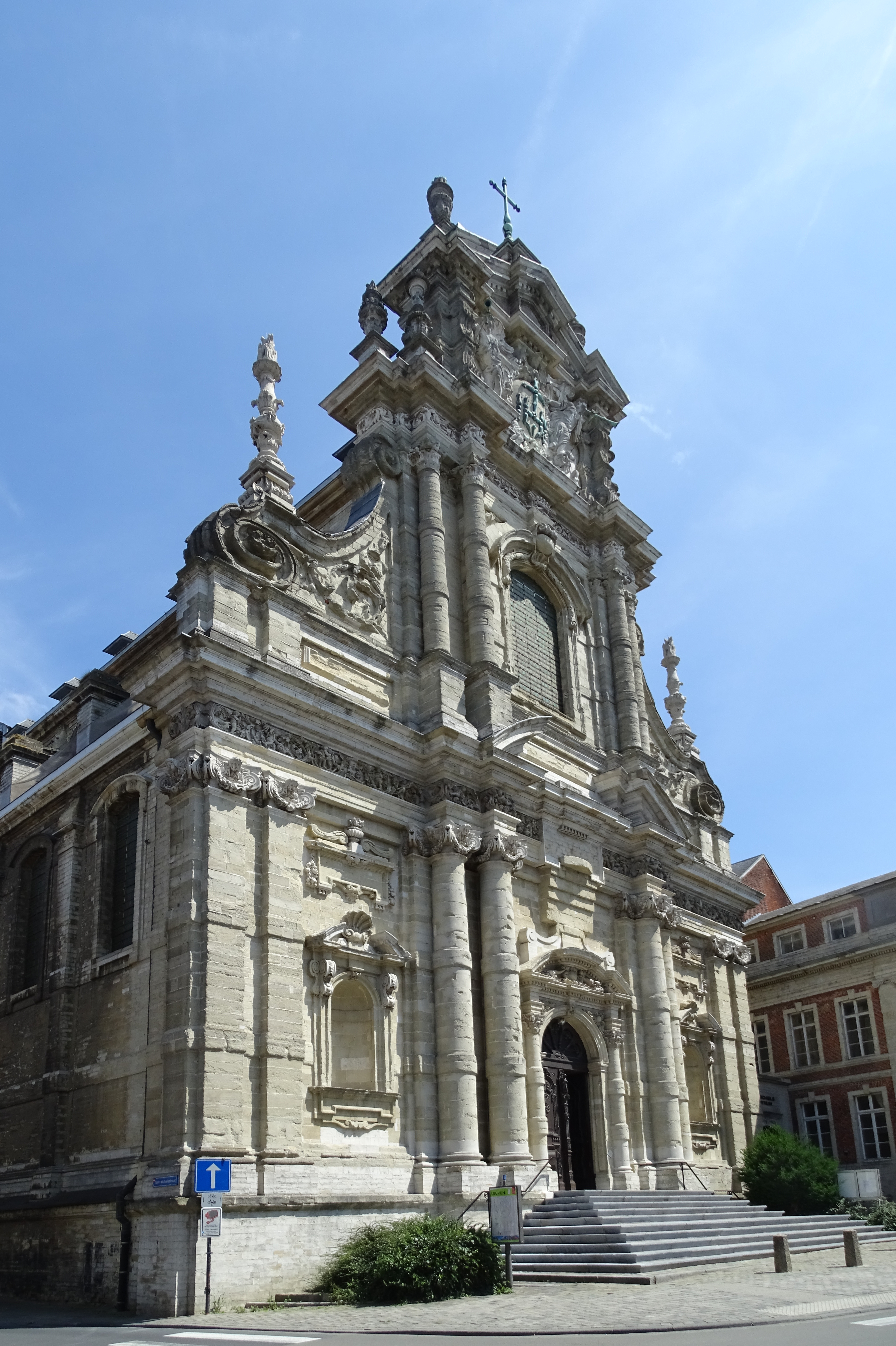 De Sint-Michielskerk te Leuven, naar een ontwerp van Willem Hesius s.j.